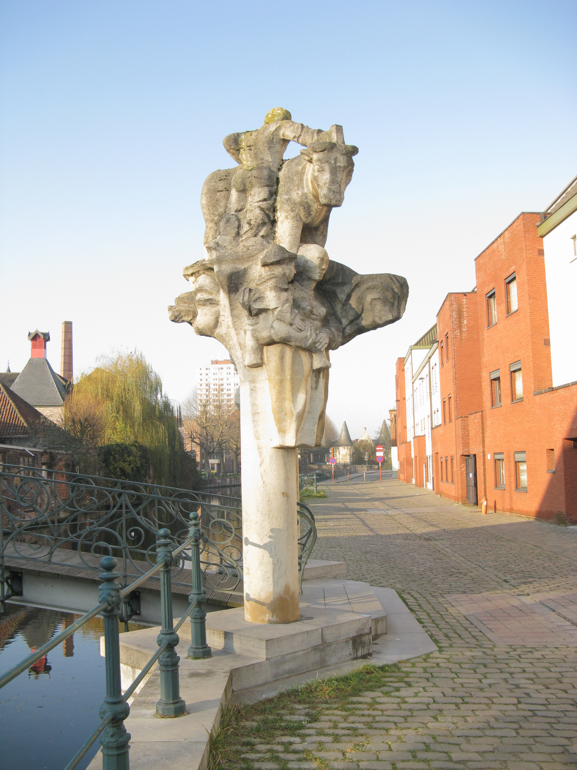 'Brug der Keizerlijke Geneugten' over de Lieve in Gent, versierd met beeldhouwwerk van Walter De Buck geïnspireerd op Vlaamse legenden over Keizer Karel V, met op de achtergrond het Rabot.